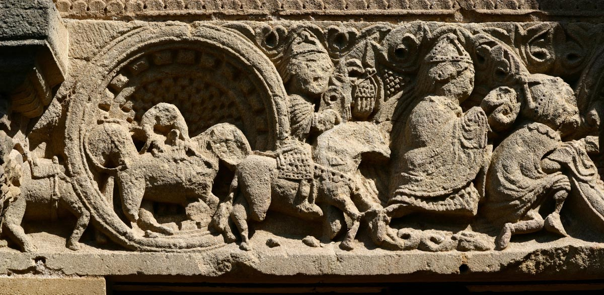 Linteau du portail de l'église de Fleury-la-Montagne